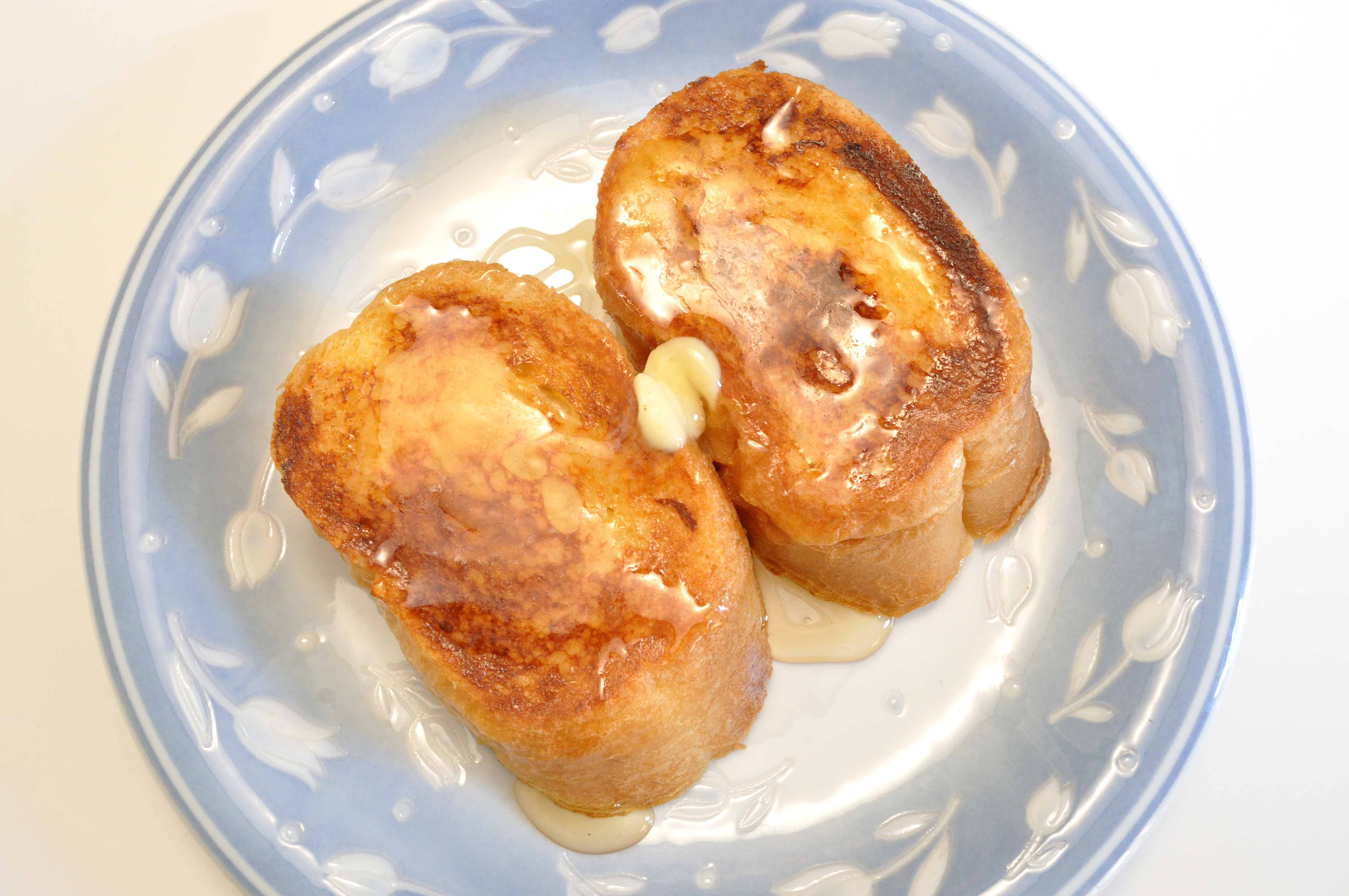 典型的なフレンチトーストの参考画像